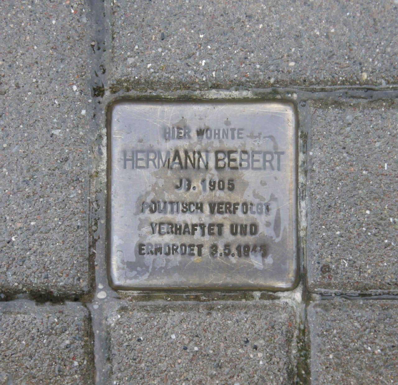 Stolperstein für Hermann Bebert, Hermann-Bebert-Straße 25a, Sassnitz